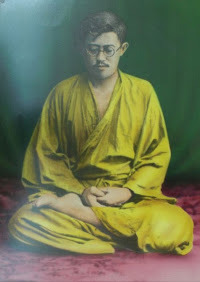 T.K. Suprana aka Poa Tjong Kwan